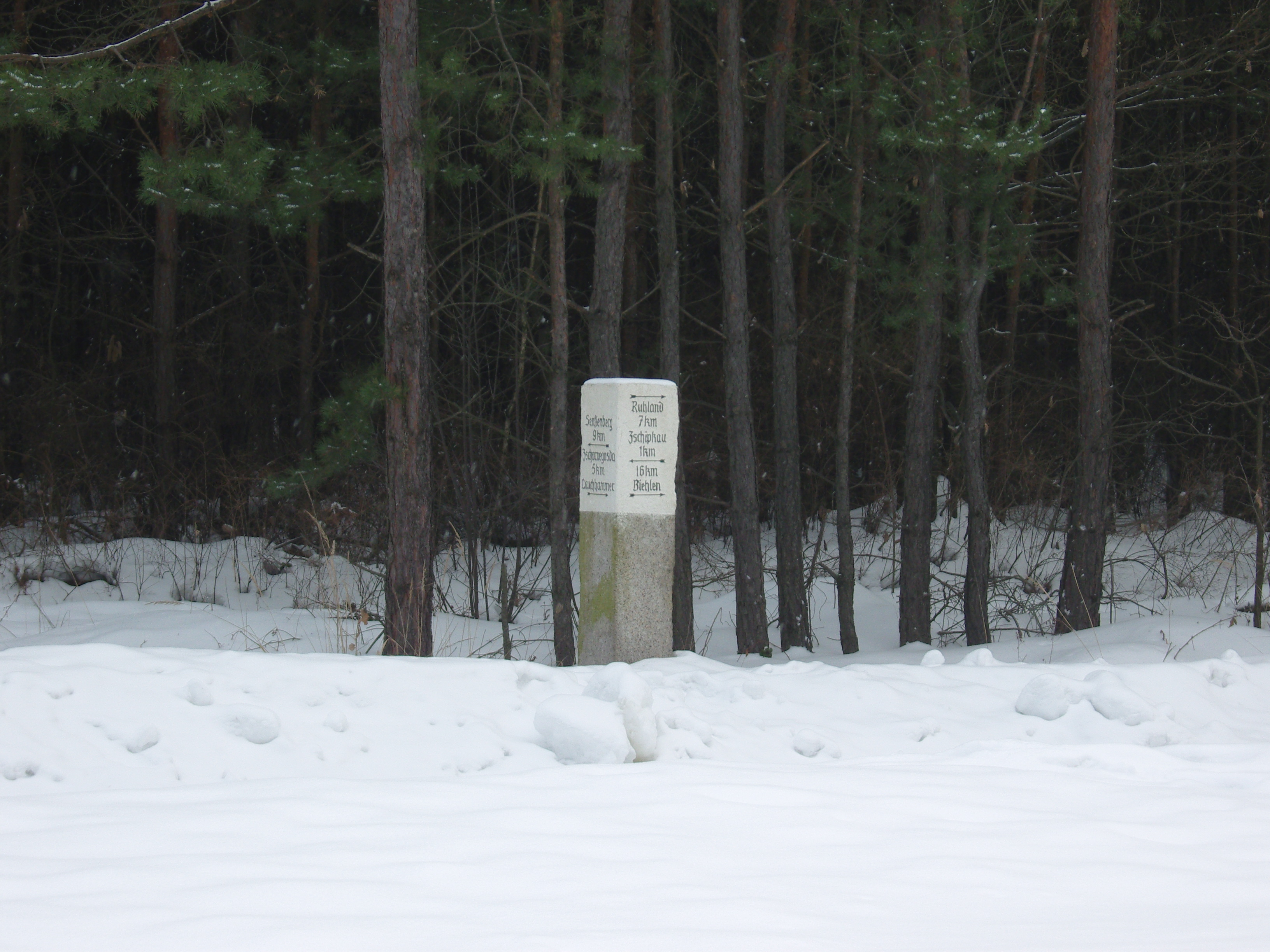 Steinerner Wegweiser an der Ruhlander Straße (Alte Poststraße) in Schipkau